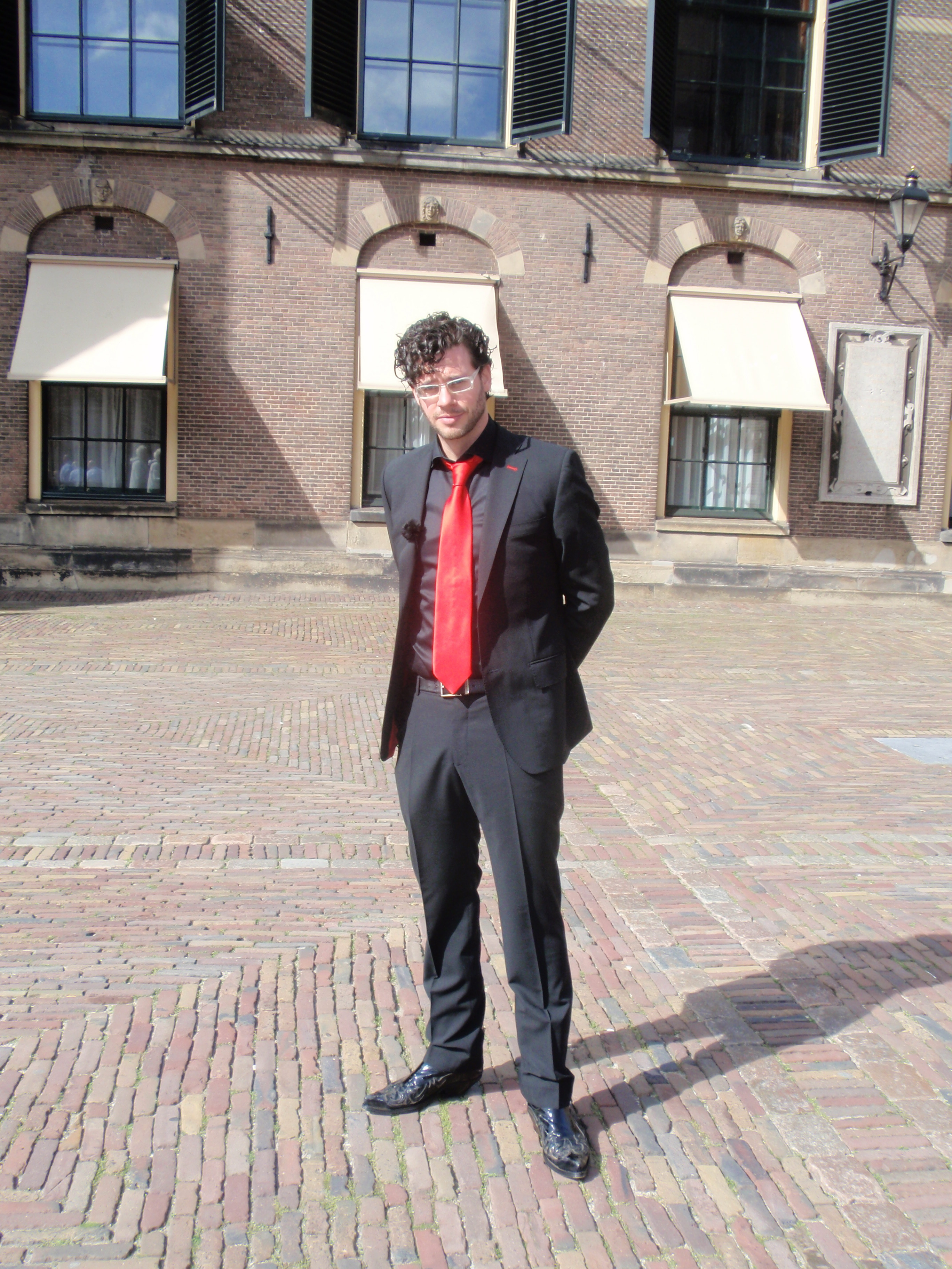 Erik Dijkstra, een van de jakhalzen van De Wereld Draait Door op het Binnenhof.